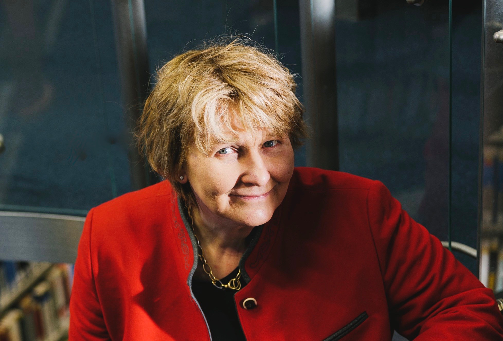 Prof. Dr. Michaela Brohm-Badry